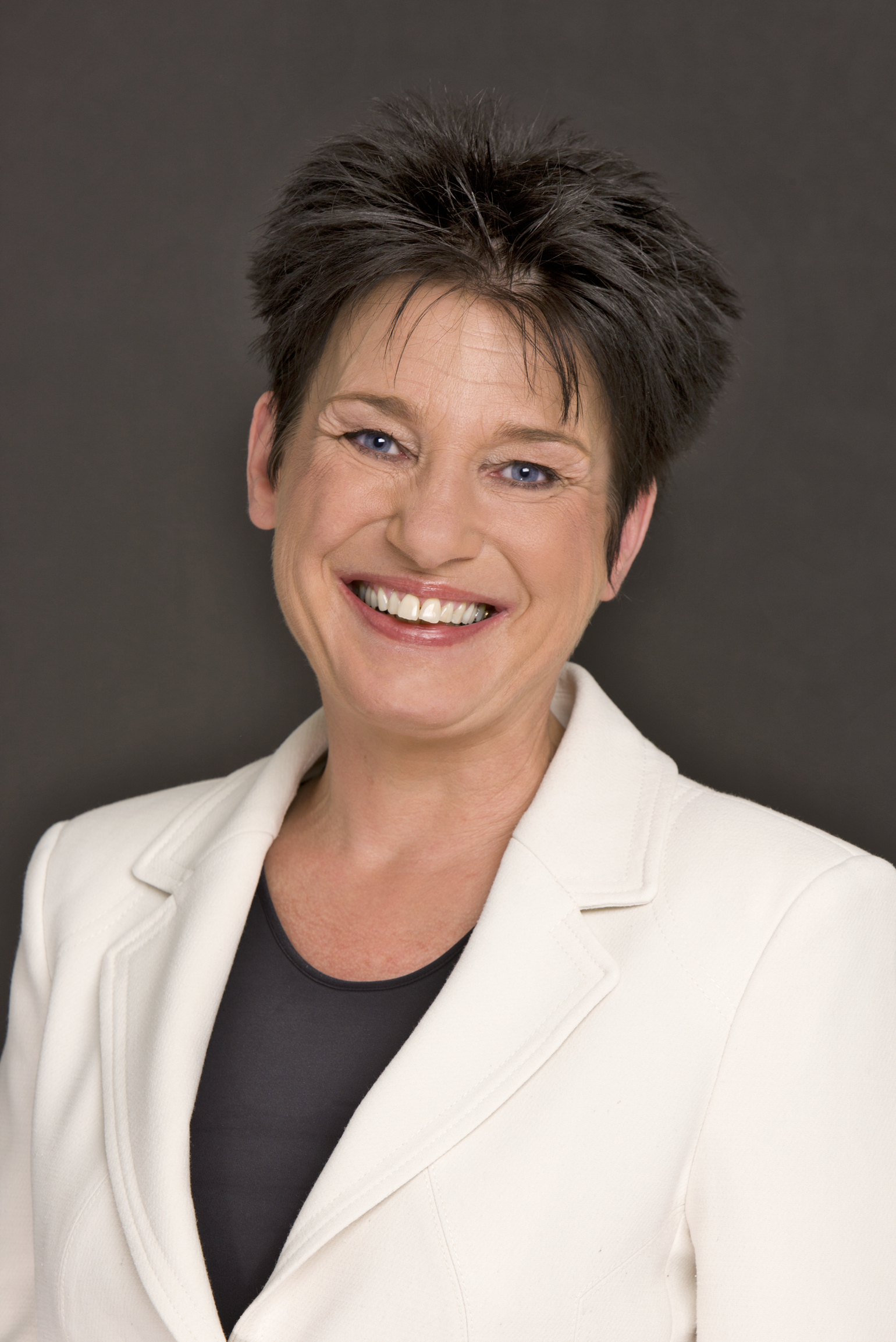 Altpeter, Katrin, MdL - LTBW 2014-08-14